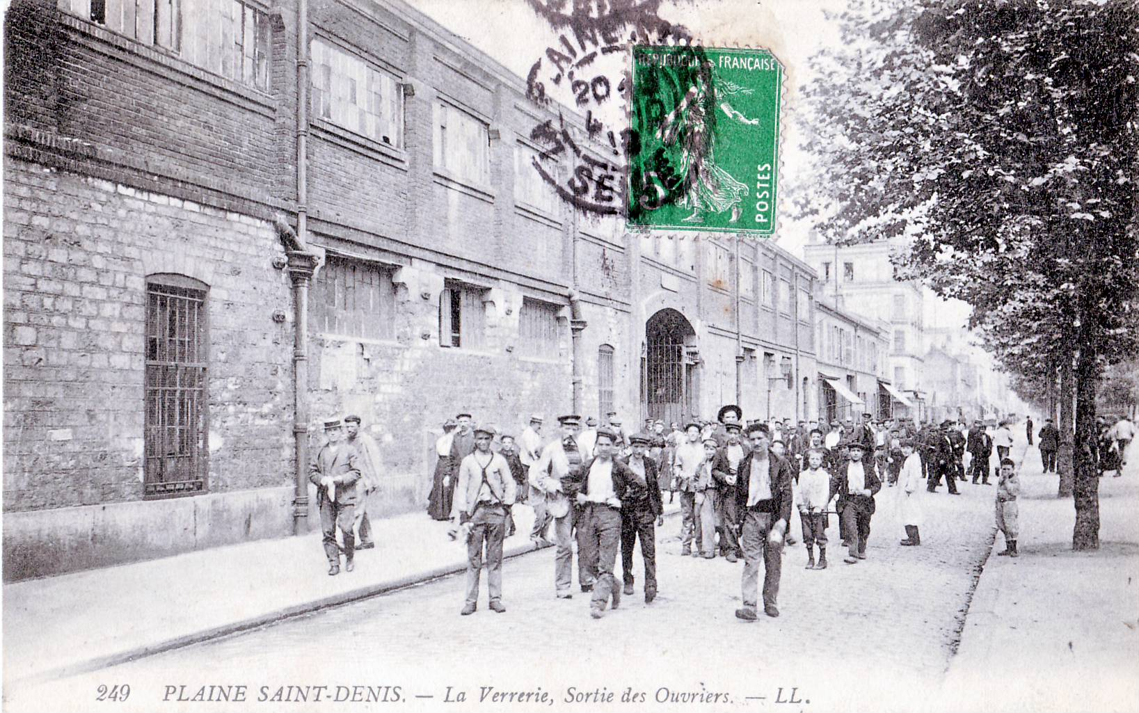 Carte postale ancienne éditée par LL N°249LA PLAINE SAINT-DENIS : La Verrerie : Sortie des Ouvriers (Commune de Saint-Denis (93) : la verrerie Legras )